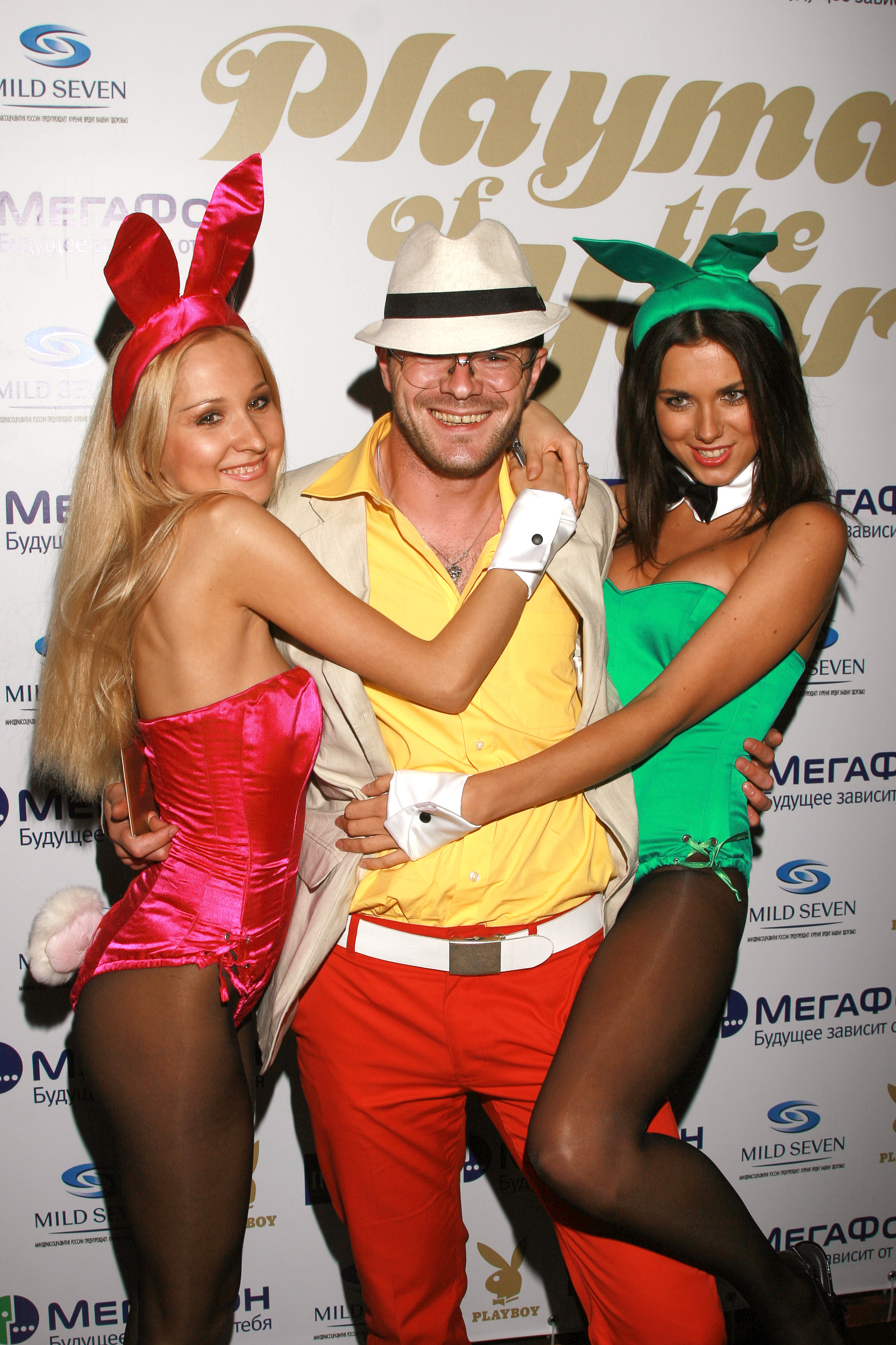 Влад Фісун, головний редактор журналу Playboy в Україні